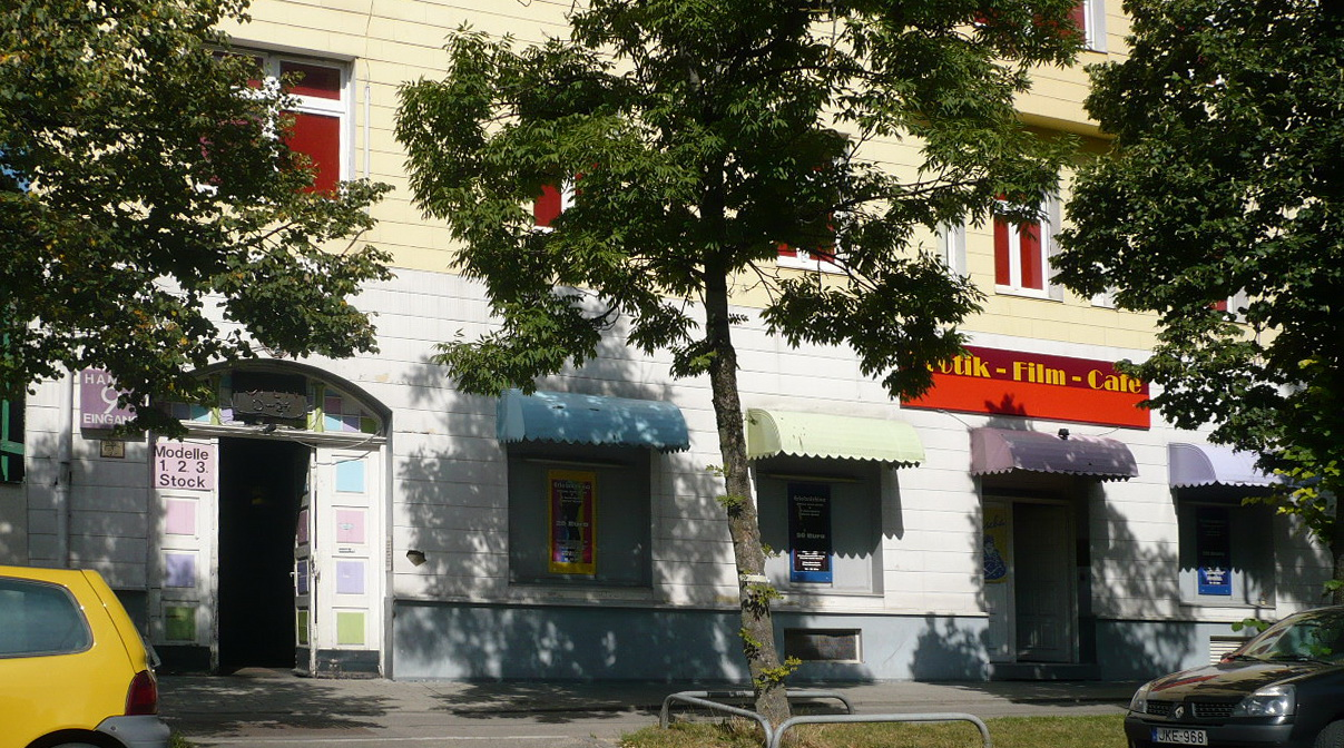 Front und Eingang des Bordells in der Hansastraße 9 in München.